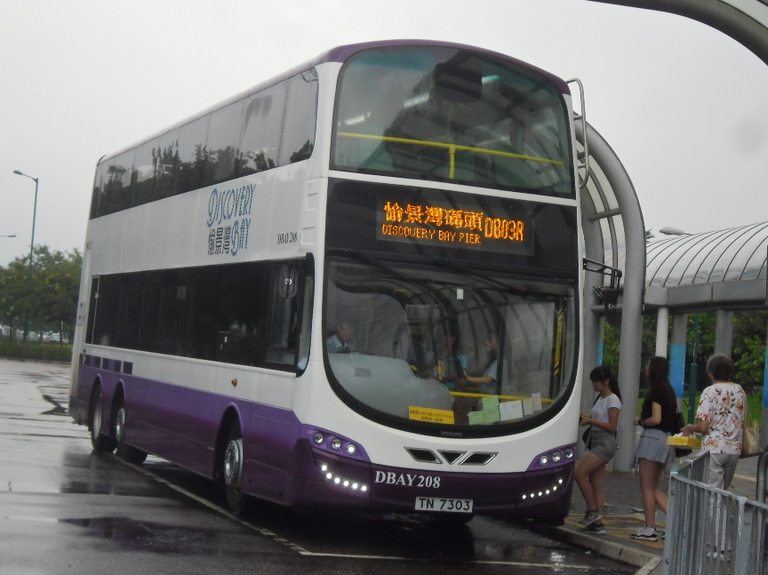 中文（香港）: 愉景灣巴士DB03R線，2015年8月起採用雙層巴士行駛